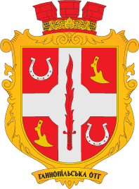 Герб Ганнопільської сільської громади